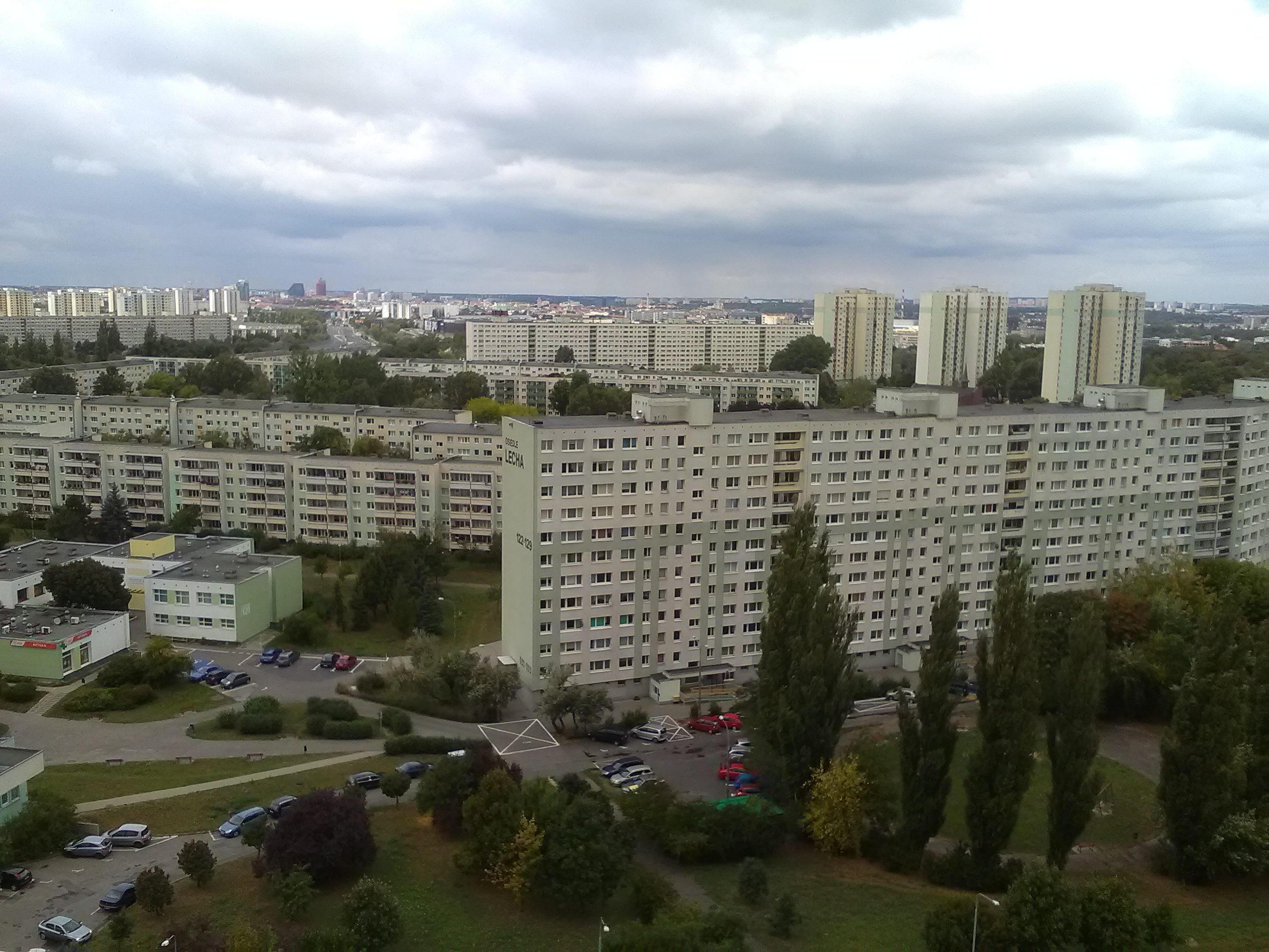 Osiedle Lecha w Poznaniu.